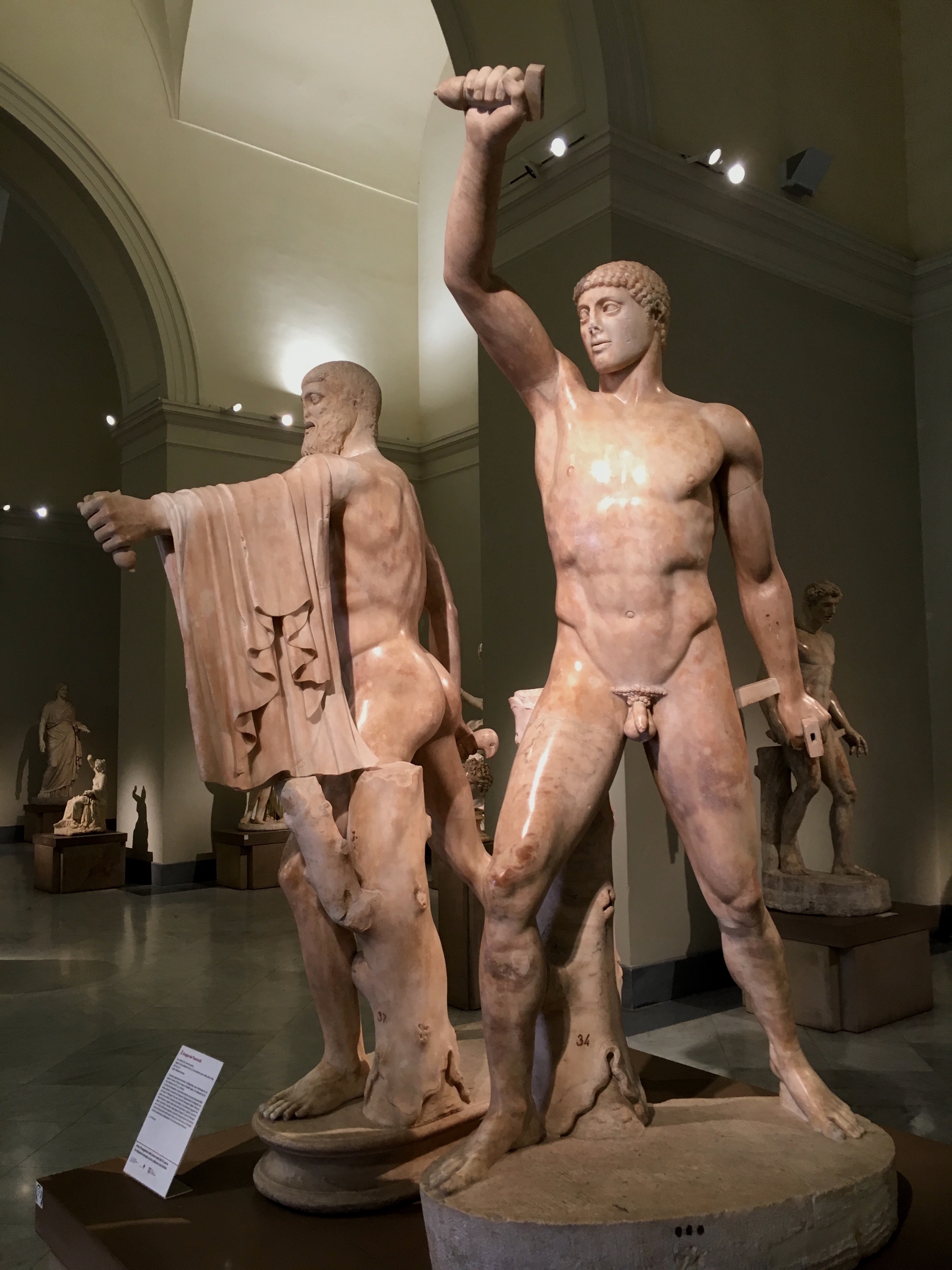 Nápoles. Museo Archeologico Nazionale. Grupo de los tiranicidas.